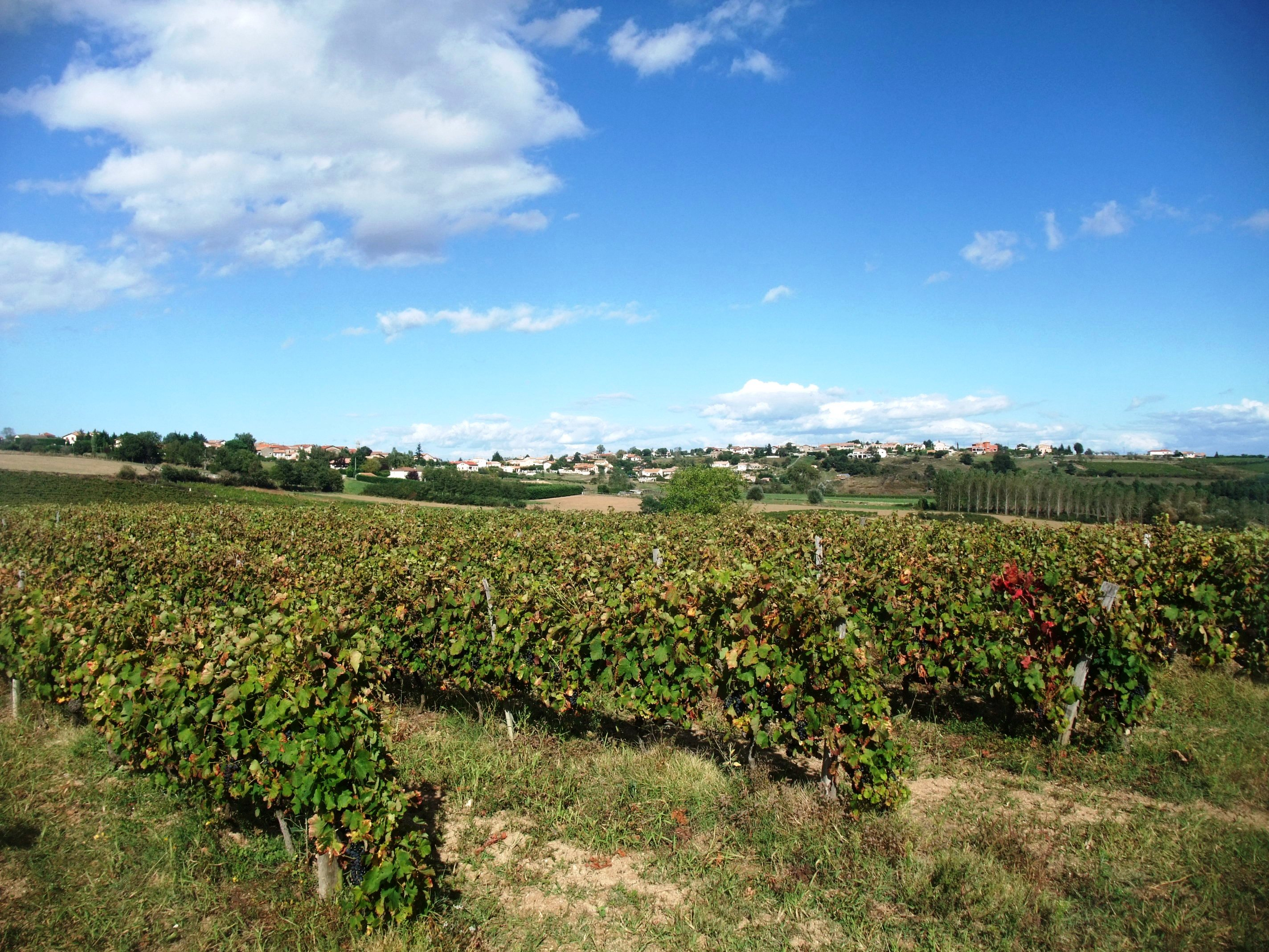 Talencieux vignes panoramique